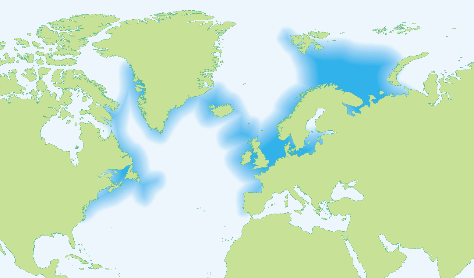 Gadus morhua (Atlantic cod) range map